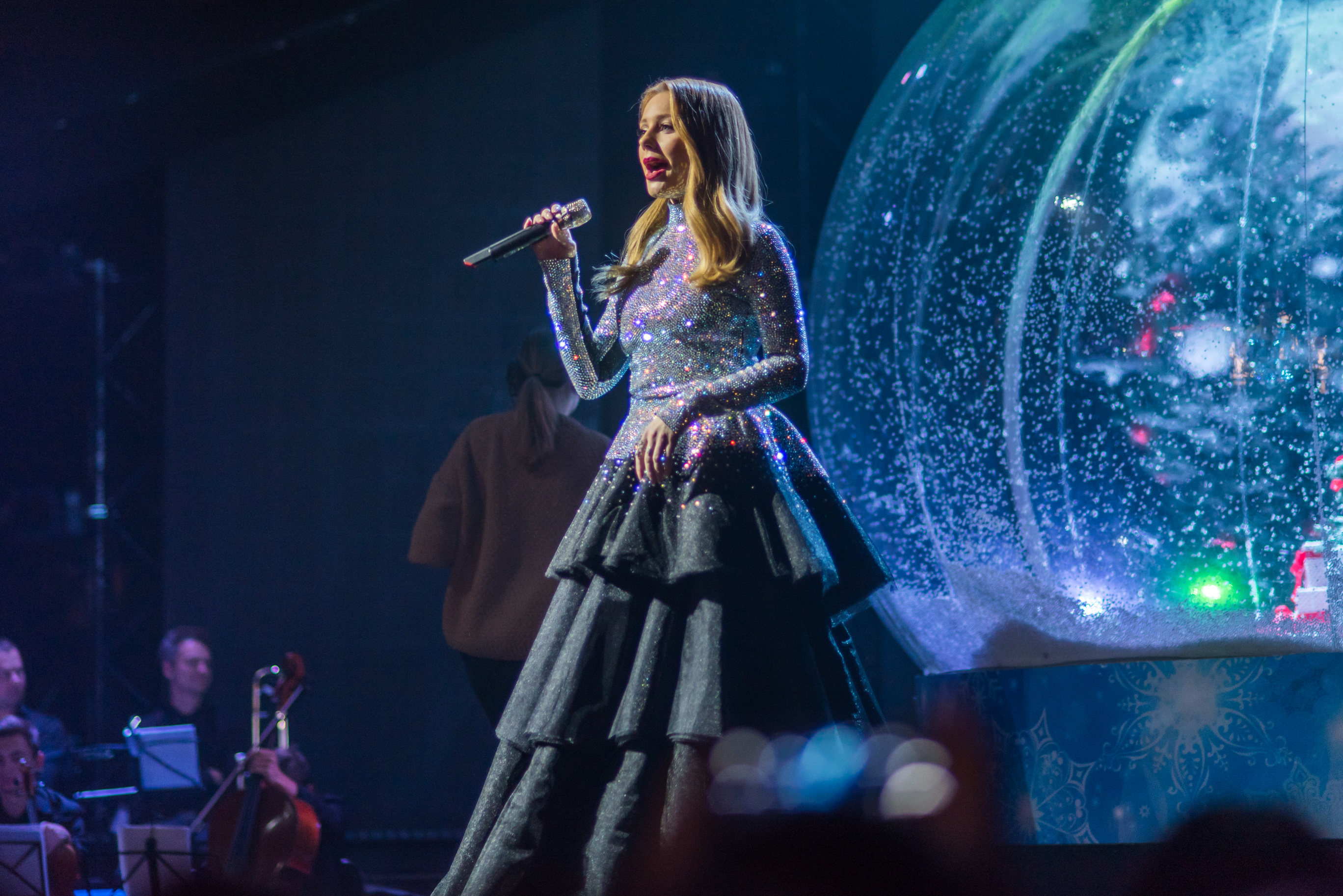 Финал Голос. Дiти 4. Тина Кароль